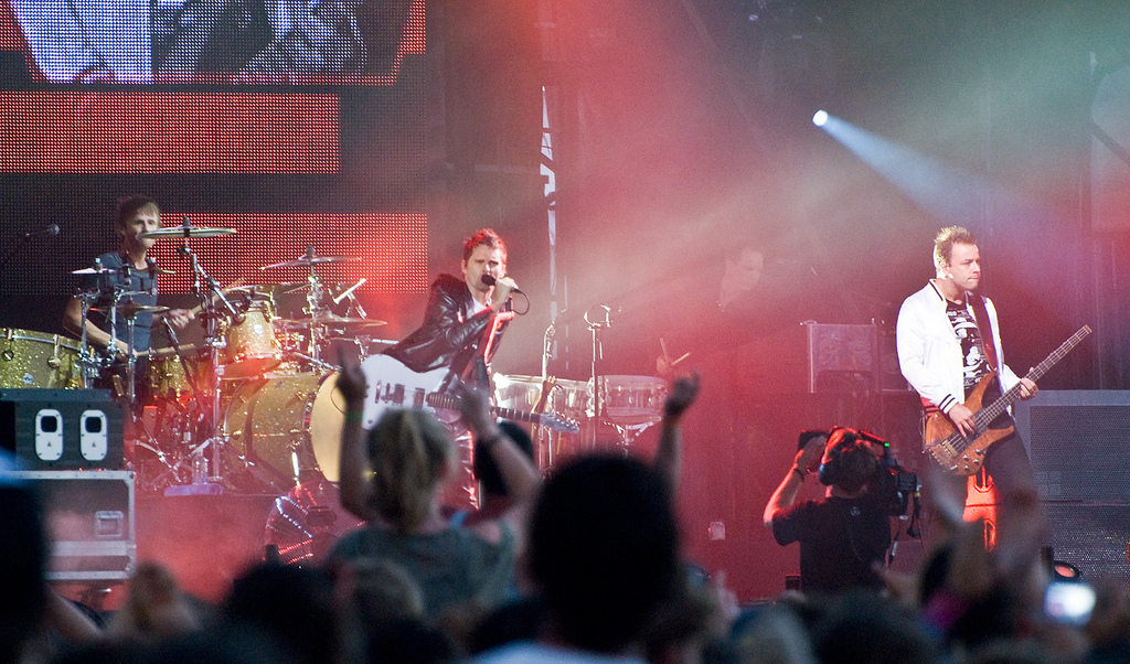 El grup anglès de rock Muse en directe al Big Day Out 2010 a Melbourne, Austràlia